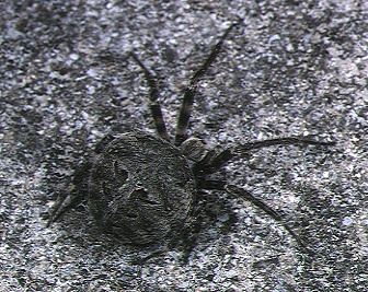 female Neoscona nautica from Okinawa.